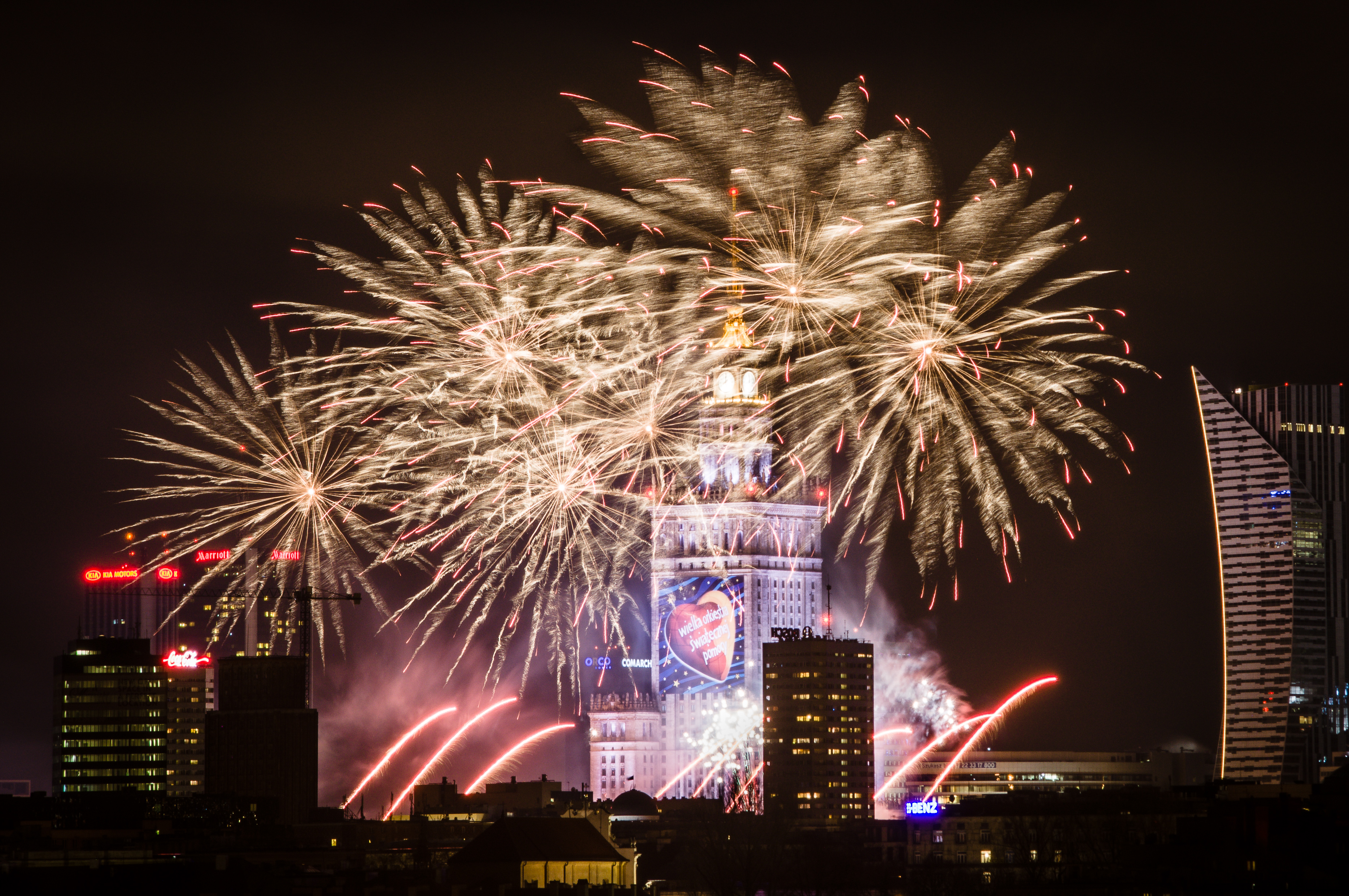 Światełko do nieba podczas XXII finału WOŚP w Warszawie (2014).